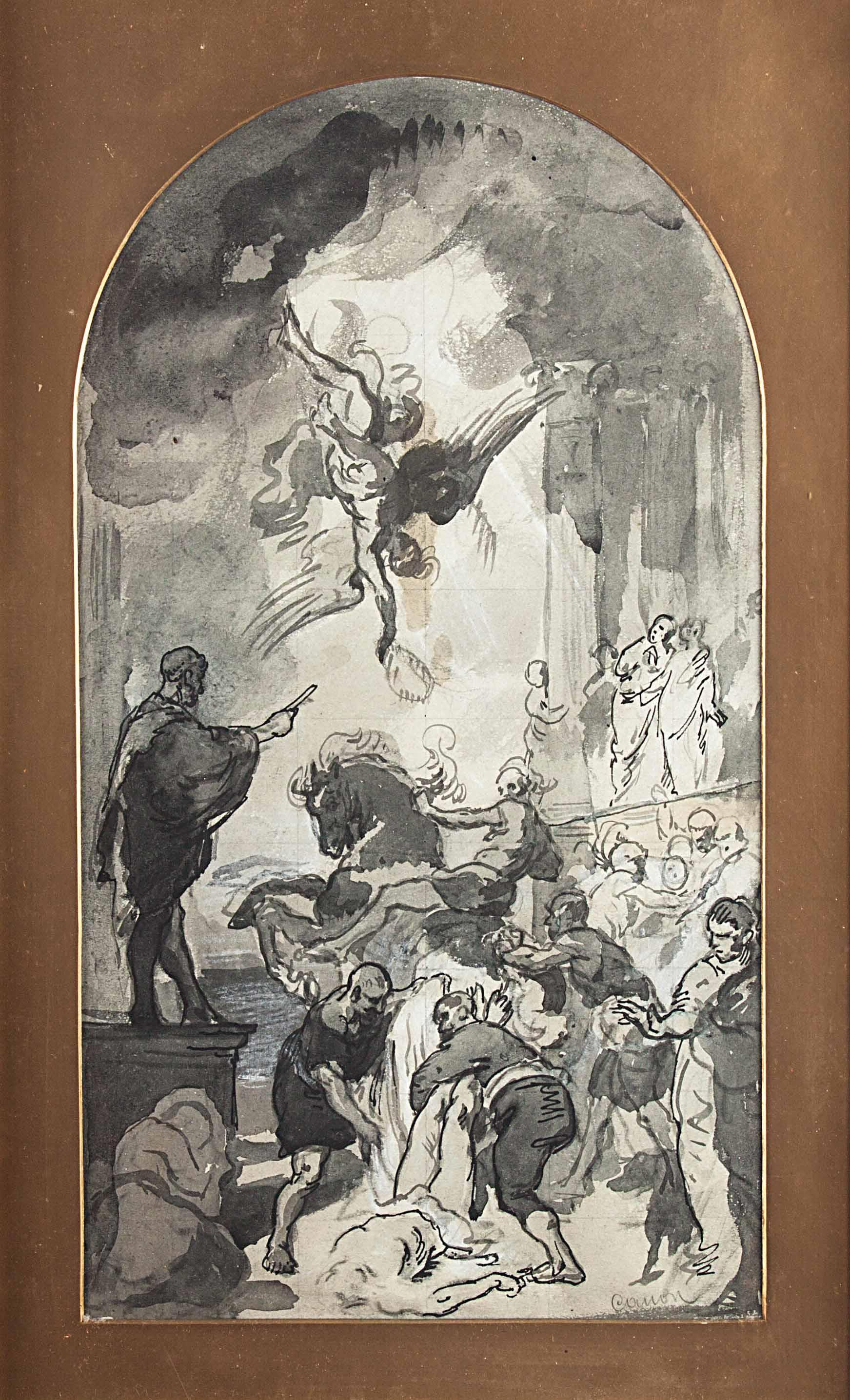 "Die Marter des Hl. Hippolytus" Entwurf für das Altarbild der Pfarrkirche St. Hippolyt in Harmannsdorf, Tusche/Aquarell, weiß gehöht, auf Papier, Bildausschnitt ca. 40 x 22 cm